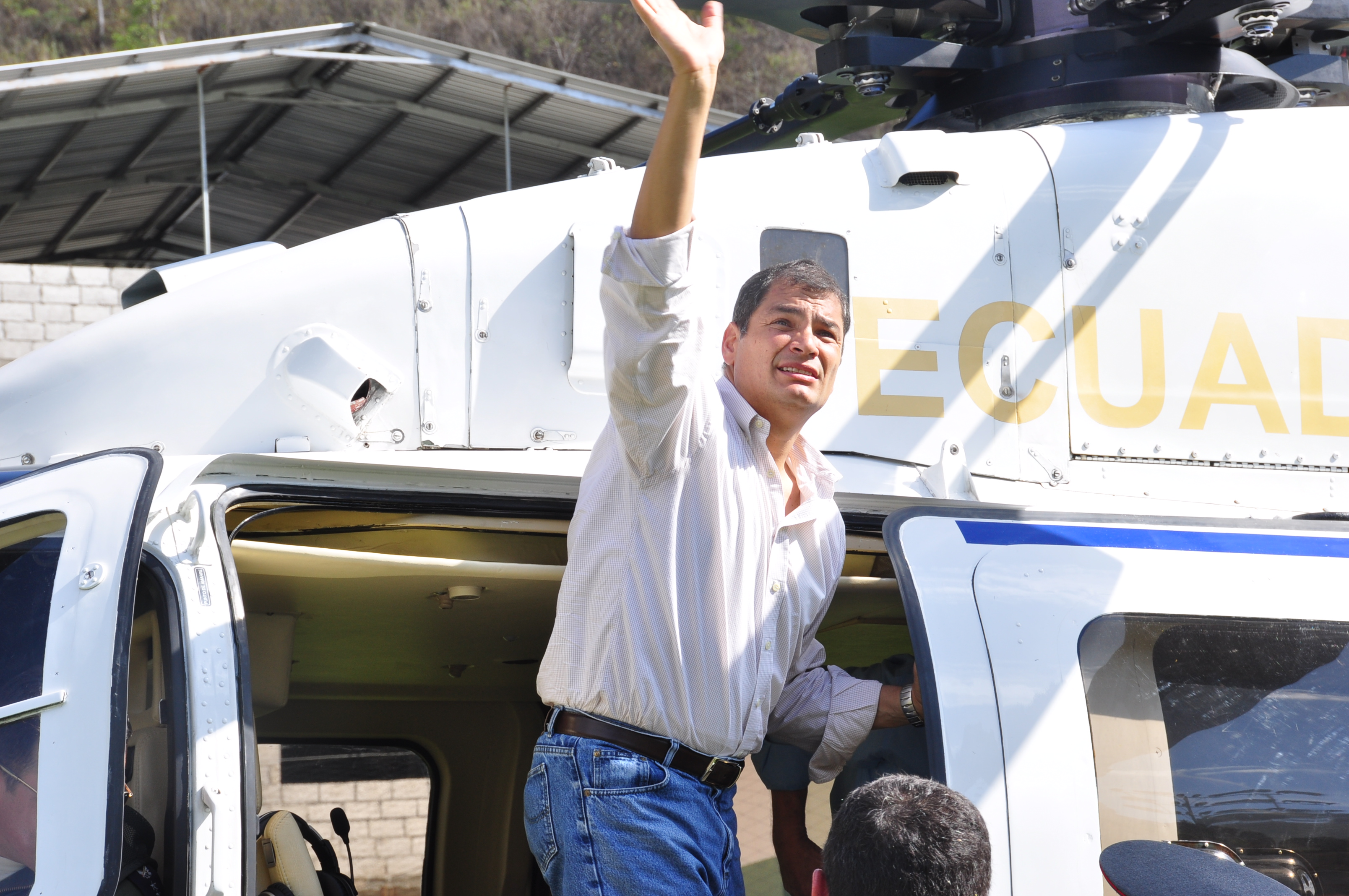 Al medio día de hoy miércoles (20) el presidente Rafael Correa Delgado vino a constatar personalmente y a dar auxilio a los mineros víctimas del derrumbe ocurrido la semana anterior en Portovelo. El alcalde de Piñas Joseph Cueva Gonzales estuvo presente acompañado por mas de 200 seguidores respaldando al mandatario.